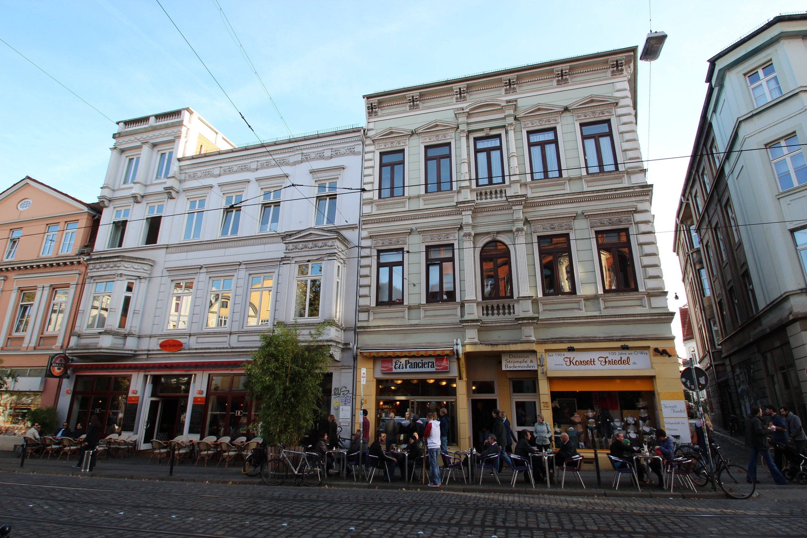 Wohn- und Geschäftshäuser in Bremen, Ostertorsteinweg 73–75Die Denkmalgruppe ist ein geschütztes Kulturdenkmal in der Freien Hansestadt Bremen, mit der Nr. 1436 beim Landesamt für Denkmalpflege registriert.